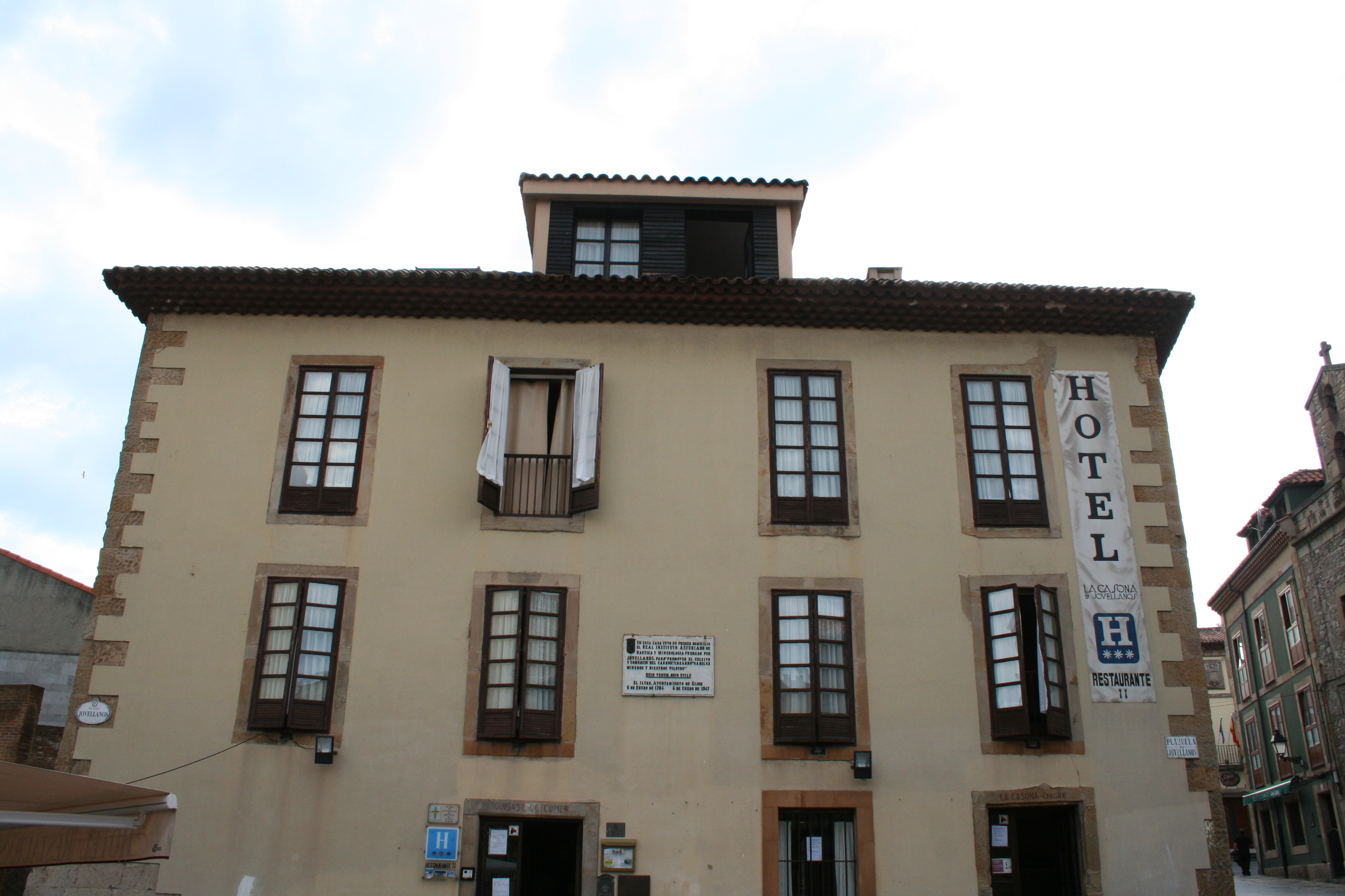 Antigua sede del Real Instituto Jovellanos